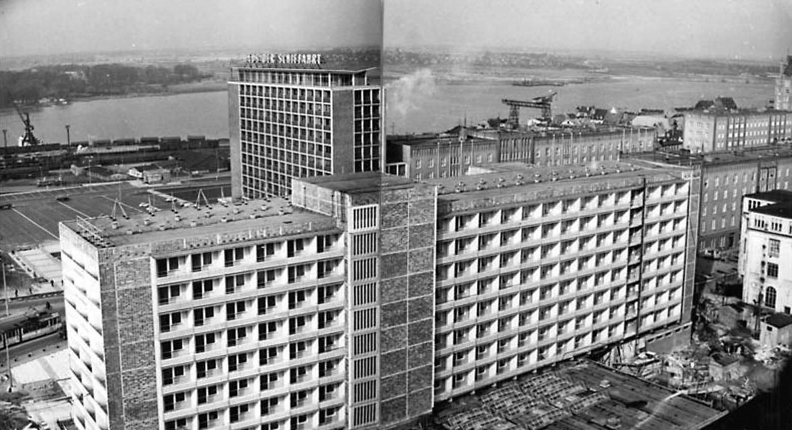 Rostock, Hotel "Warnow", Haus der Schiffahrt Zentralbild Lehmann Th-Tie 4.4.1967 Rostock: Das Hotel "Warnow" erwartet zur Jubiläums-Ostseewoche 1967 die ersten Gäste. Der moderne Hotelkomplex verfügt über 342 Zimmer mit 558 Betten. In den dazugehörigen Restaurants und Bars ist Platz für rund 700 Gäste. 370 Kellner, Köche, Hostessen und Lehrlinge betreuen die Gäste. (Panorama 2 Teile)